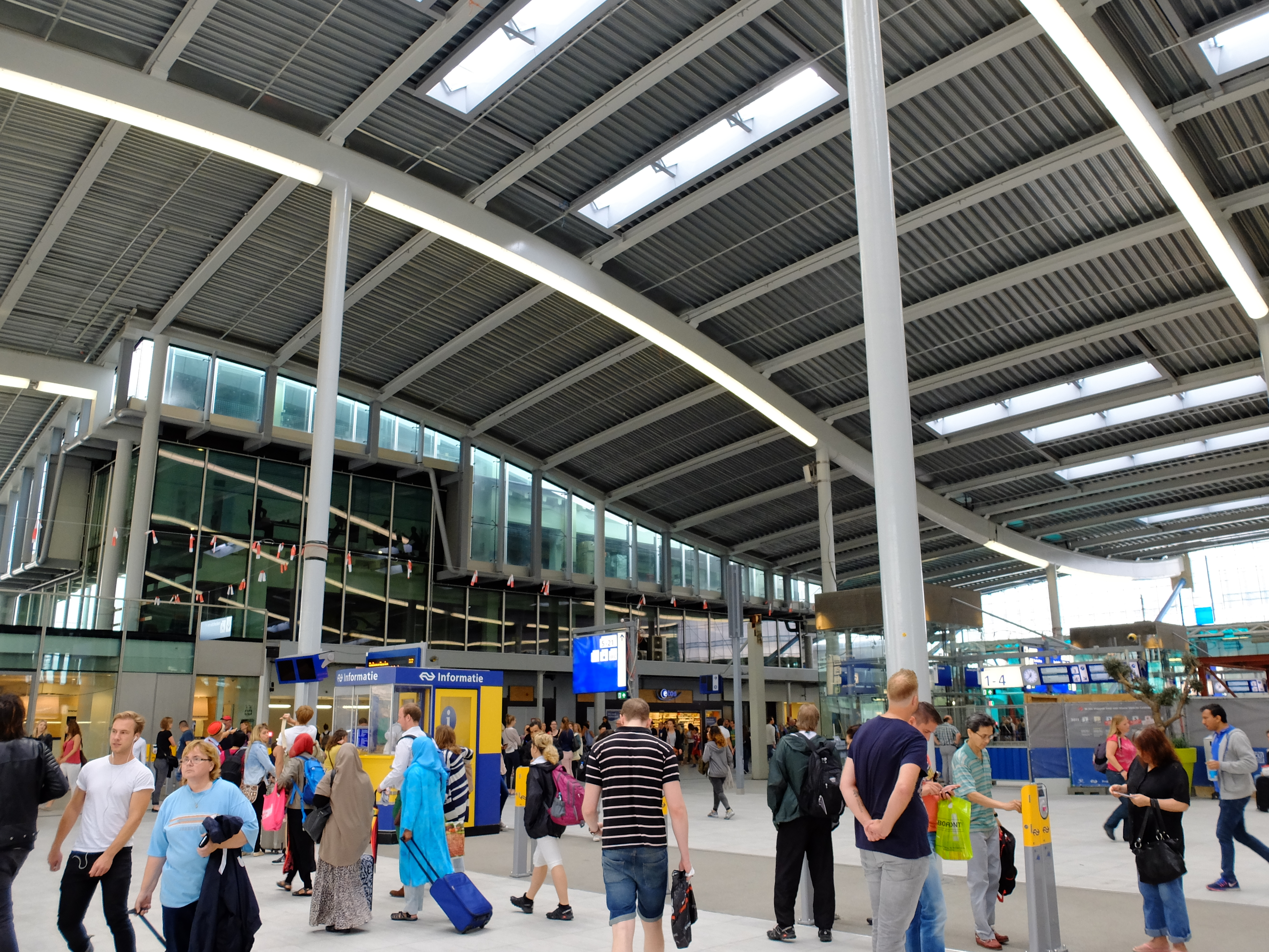 Utrecht Centraal, na de verbouwing.